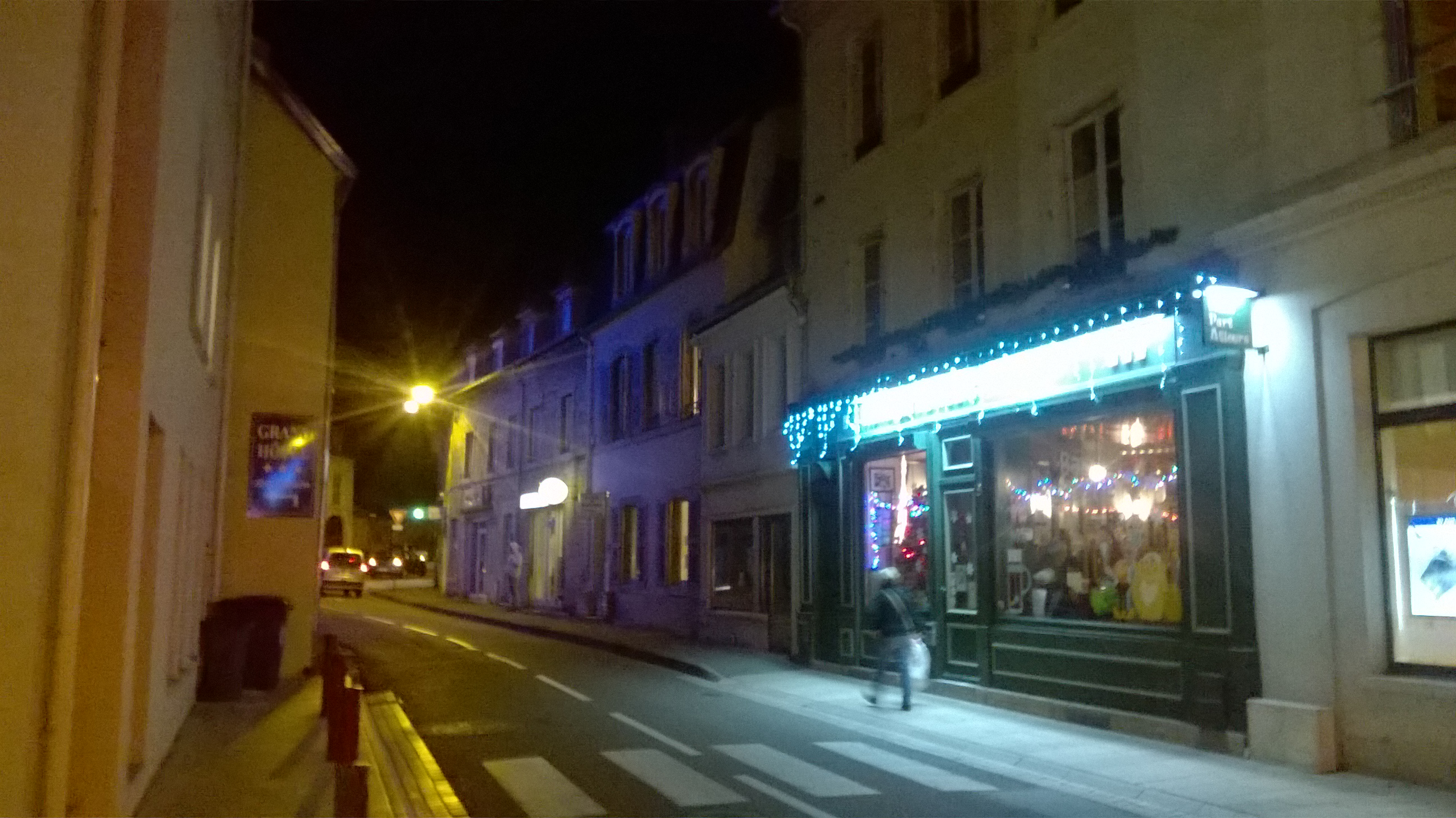 La rue de l'Aigle-Noir à Vesoul